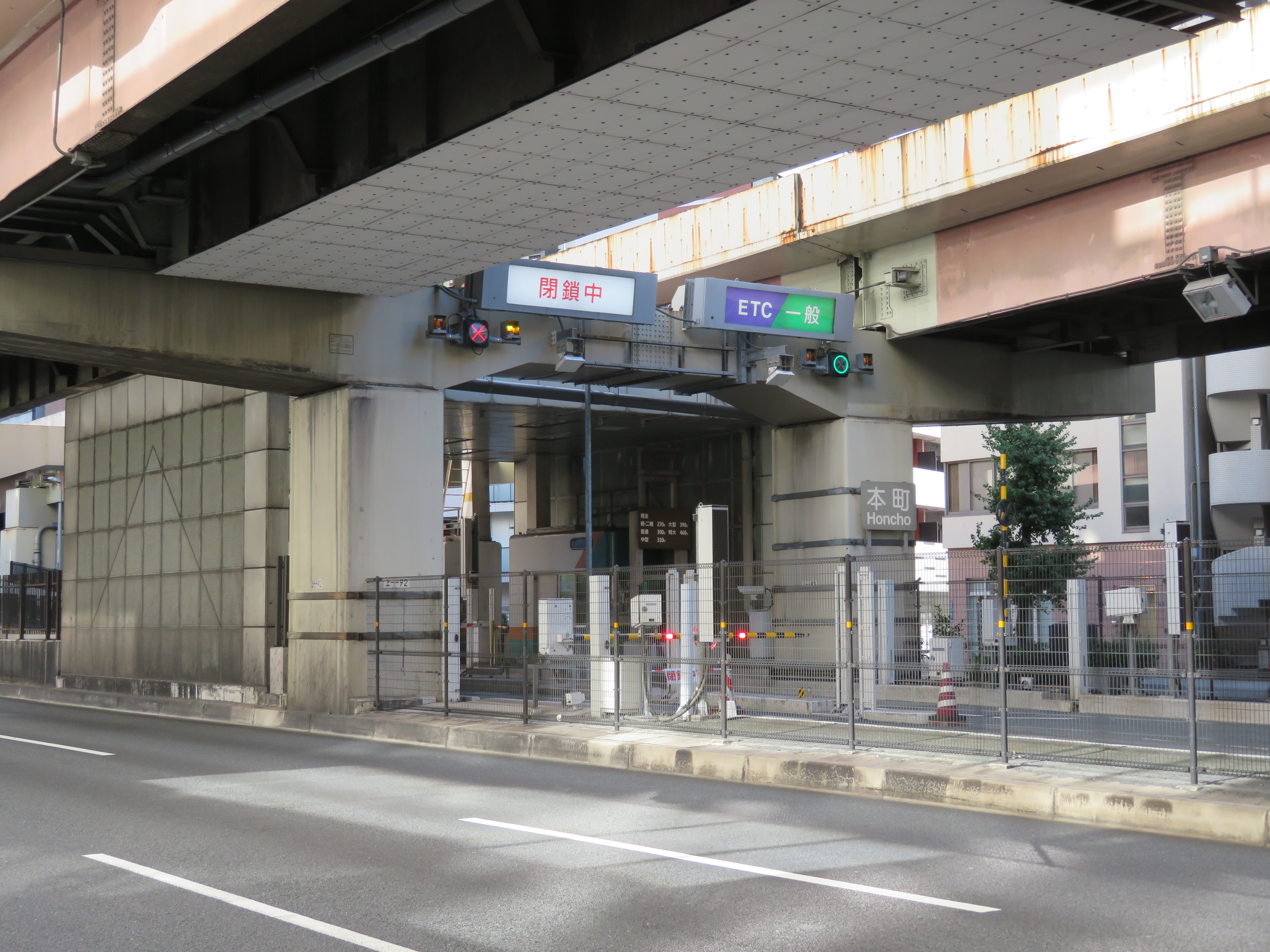 首都高速1号上野線本町入口（入谷方面側入口料金所を撮影） Canon PowerShot SX720 HS